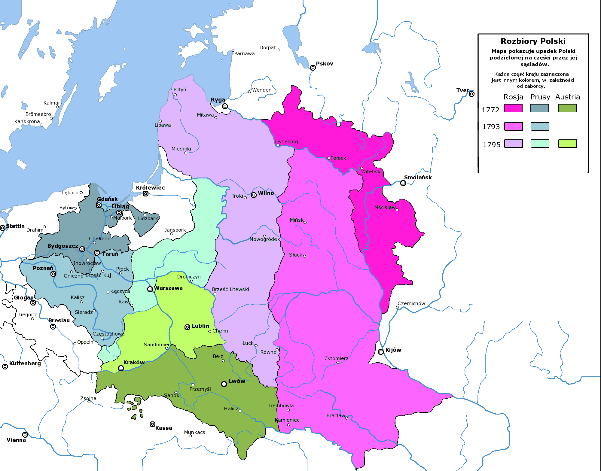 Rozbiory Polski - mapa